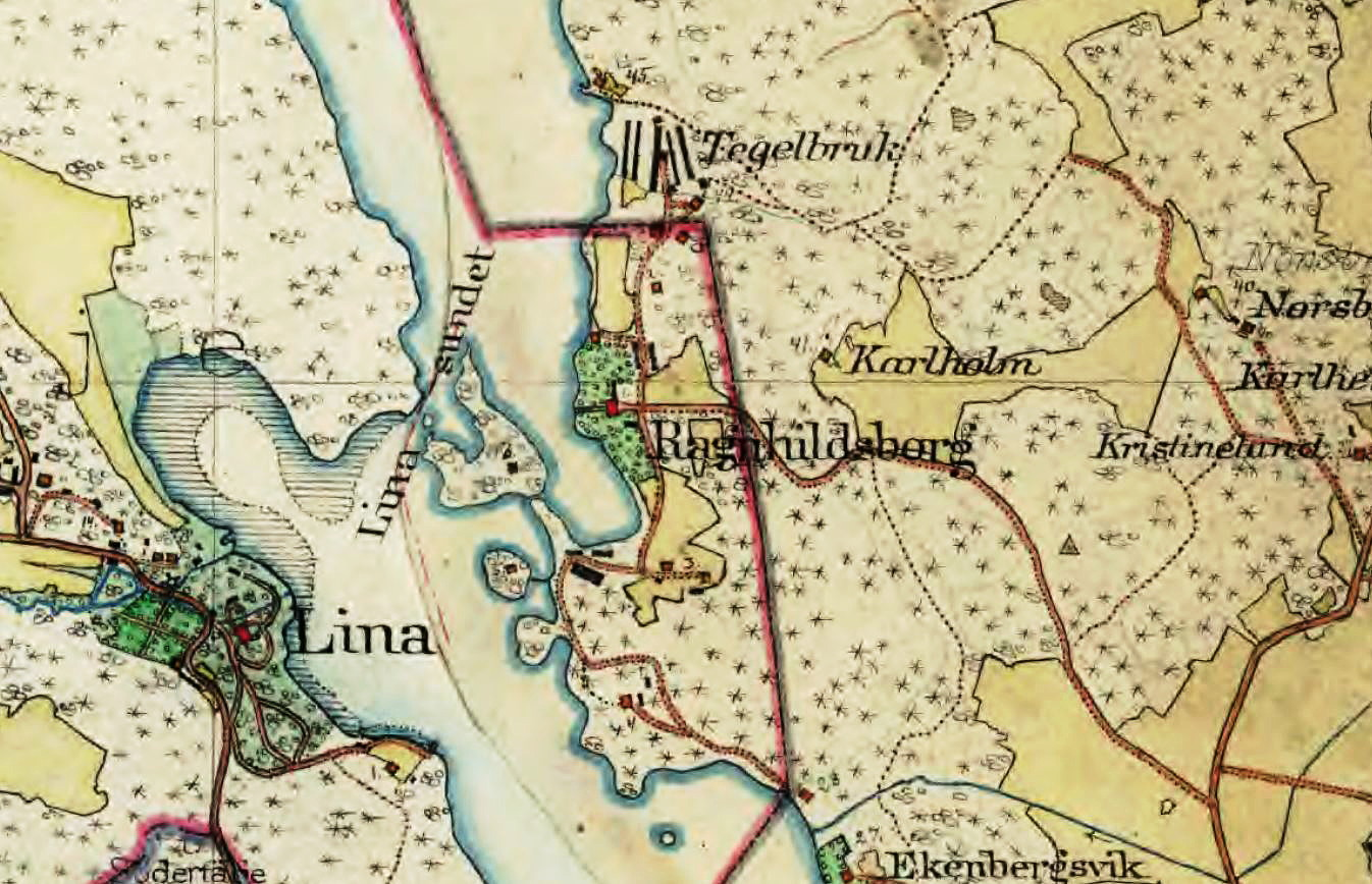 Del av Häradsekonomiska kartan visande Ragnhildsborg och Lina